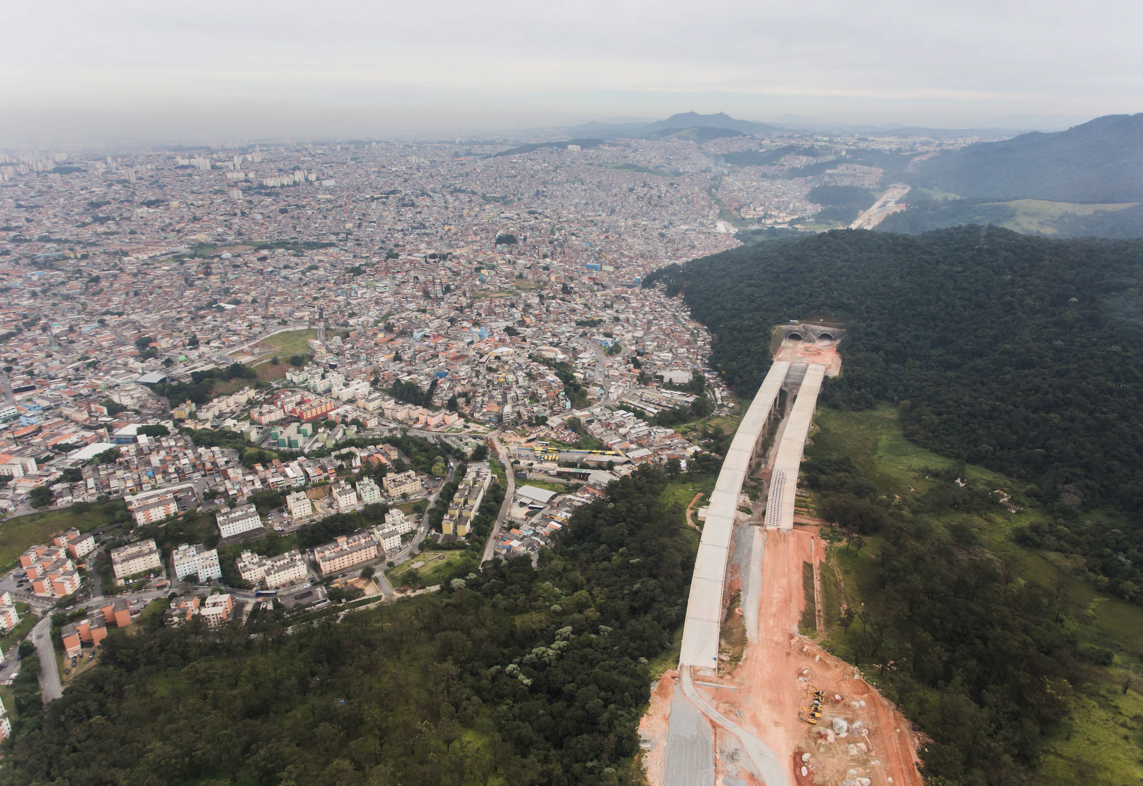 O Governador do Estado de São Paulo Geraldo Alckmin, paricipou de visita técnica ao Lote 3, do trecho Norte do "Rodoanel Mário Covas". Local: São Paulo/SP. Data: 12/06/2017. Foto: Alexandre Carvalho/A2img